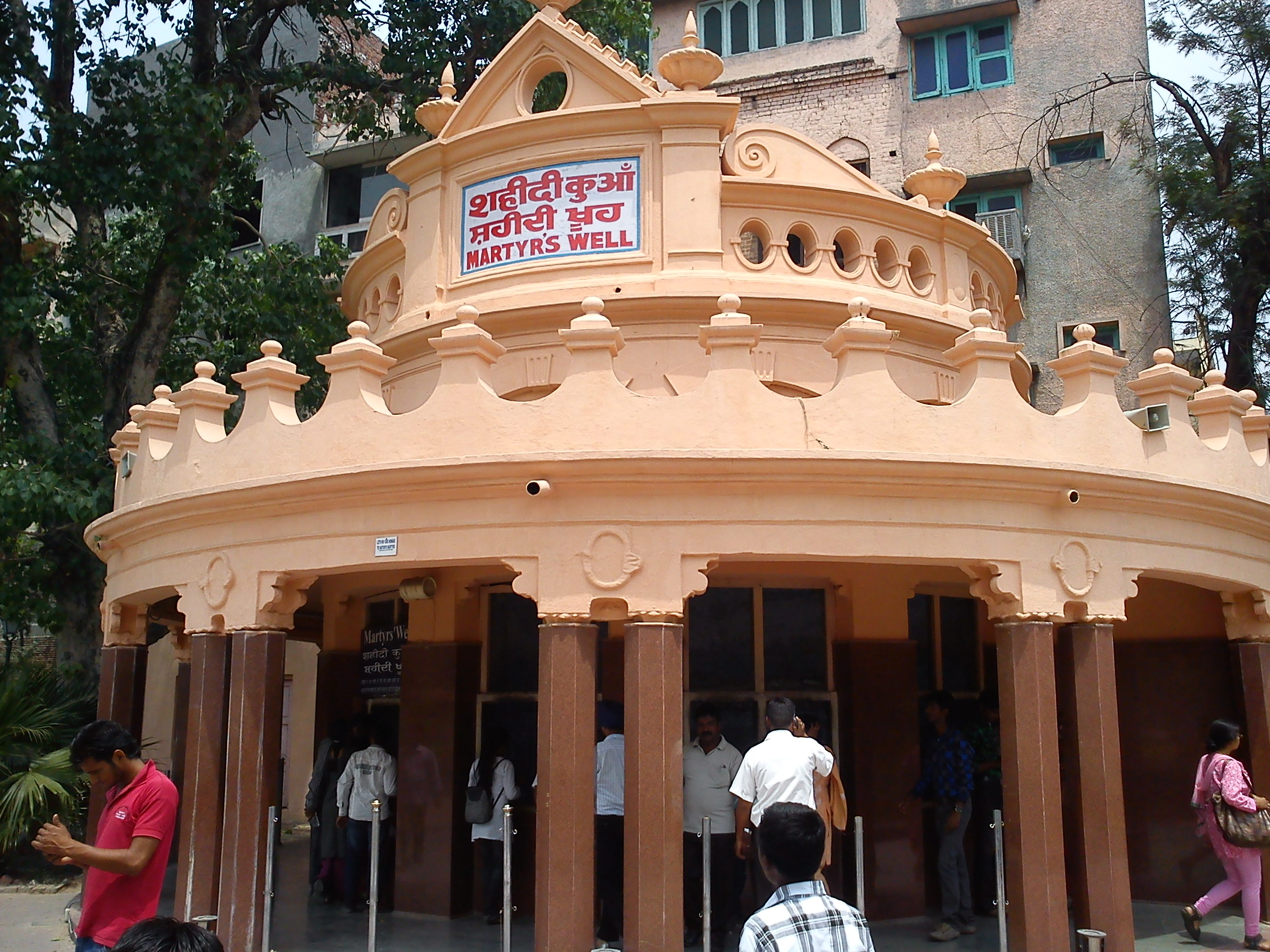 ജാലിയാം_വാലാ_ബാഗ്-രക്തസാക്ഷികളുടെ കിണർ